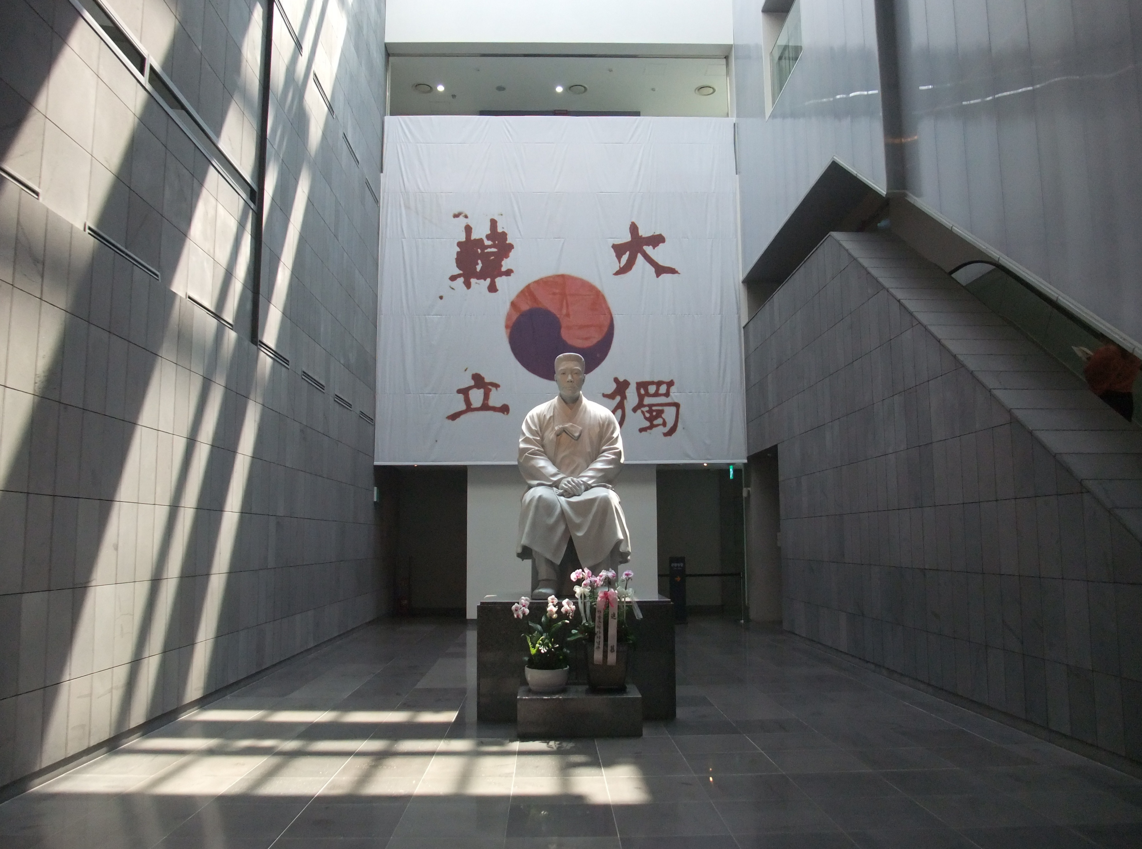 首爾安重根義士紀念館內安重根像